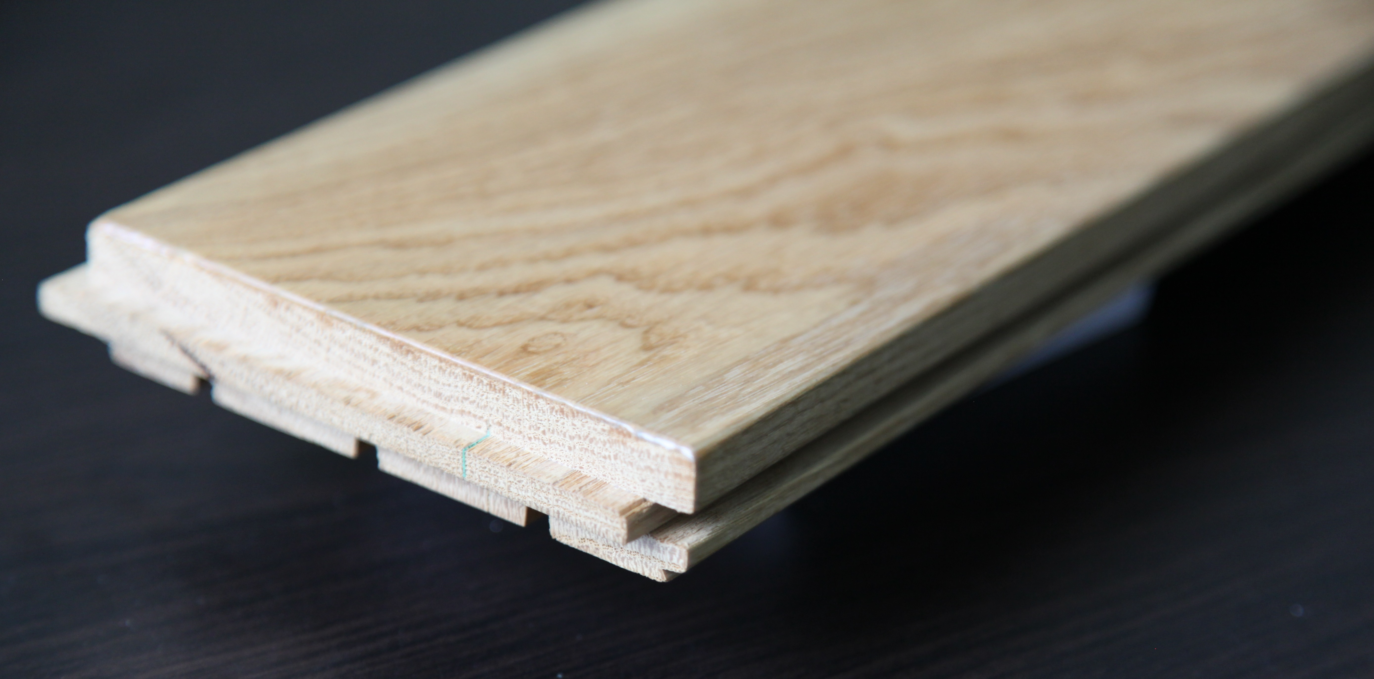 Массивная доска. Лицевая сторона. Виден профиль шип-паз по периметру и продыхи снизу.